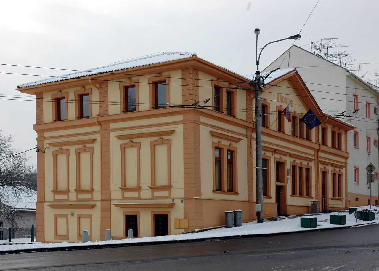 Radnice Ostrava-Michálkovice